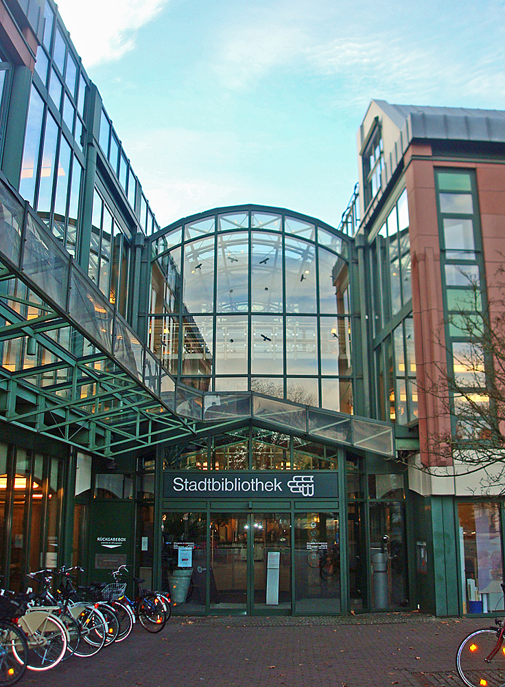 Eingang der Stadtbibliotek Gütersloh